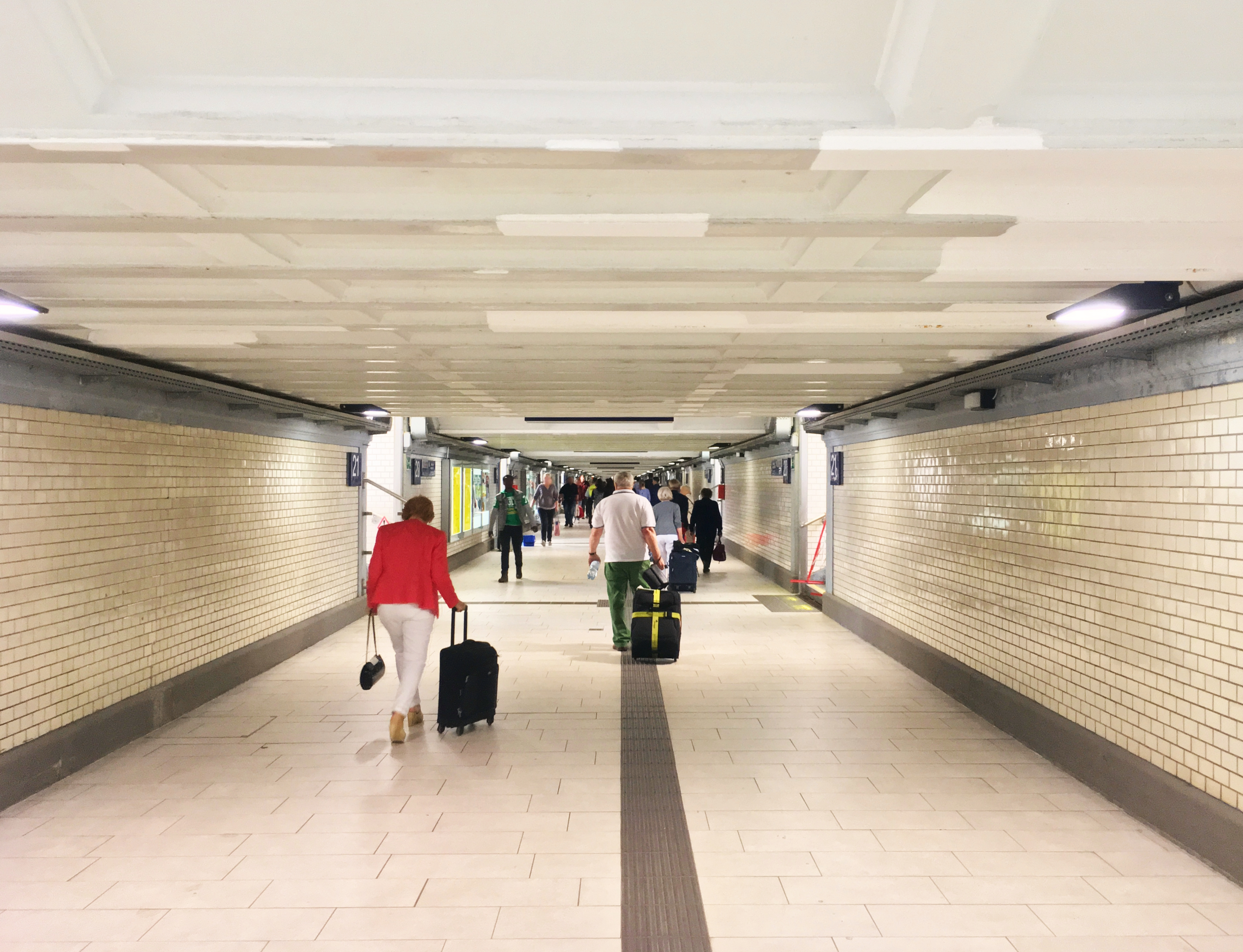 Mittelgang des Nürnberger Hauptbahnhofs.